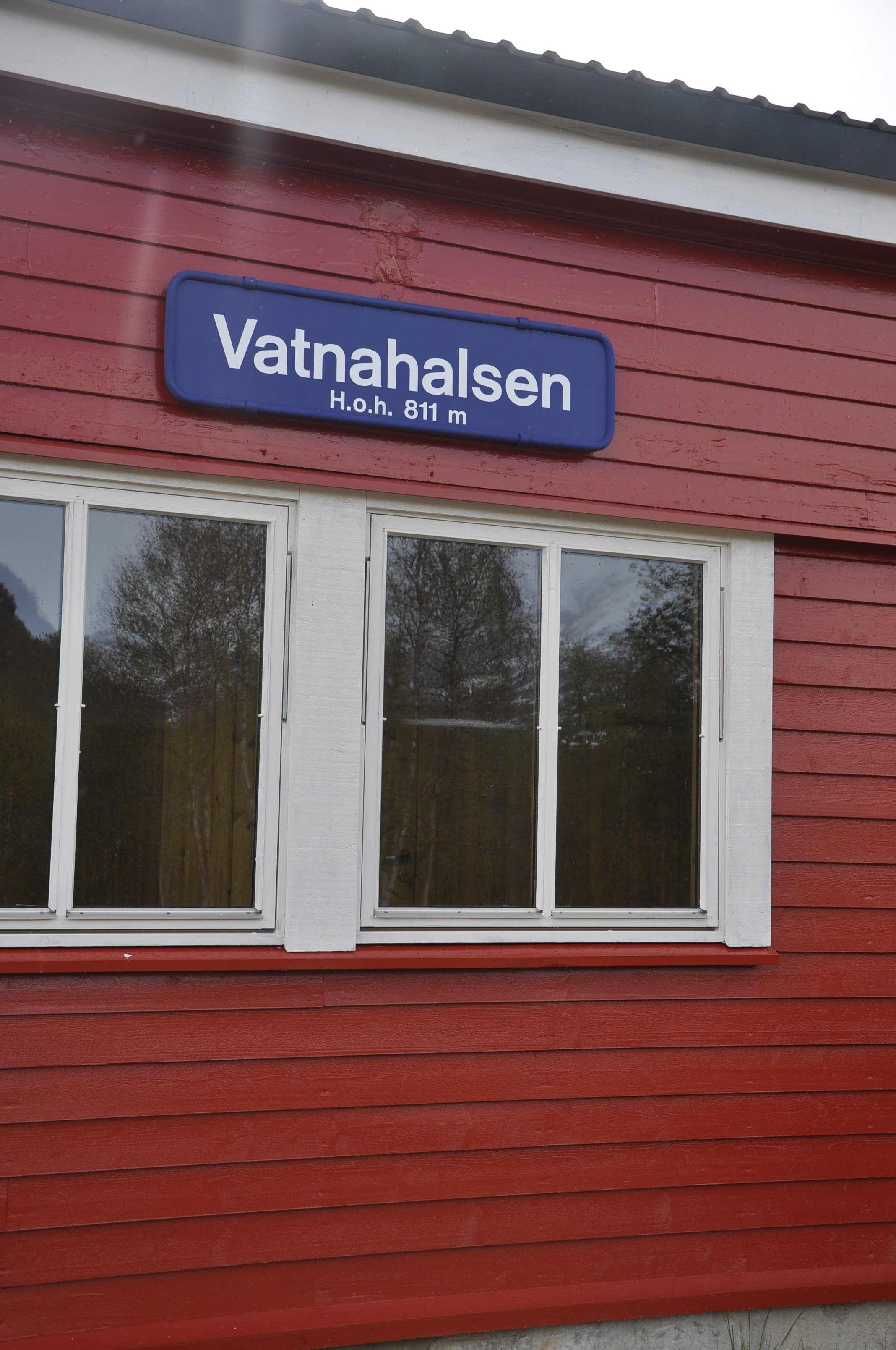 Vatnahalsen haldeplass på Flåmsbana